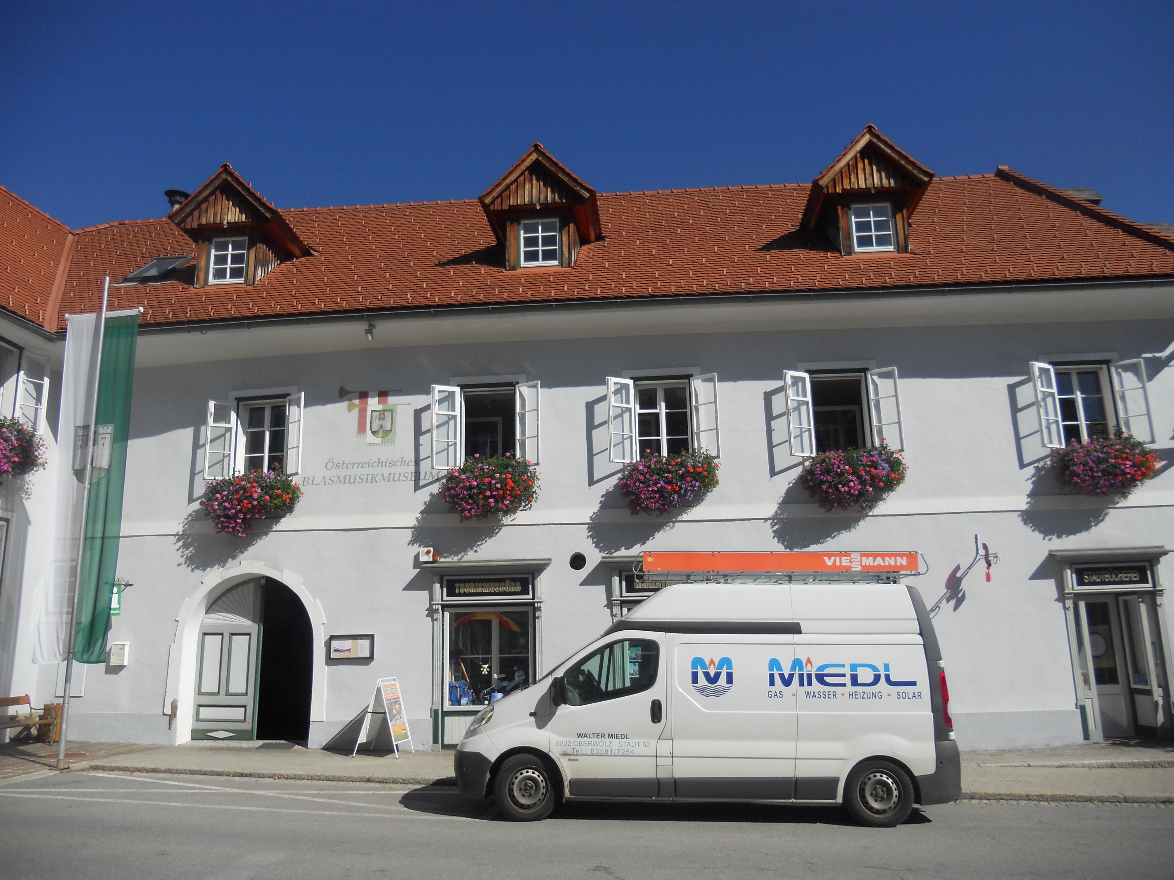 Blasmusik- und Heimatmuseum am Hauptplatz in Oberwölz, darin ist ein Teil der Stadtmauer integriert.